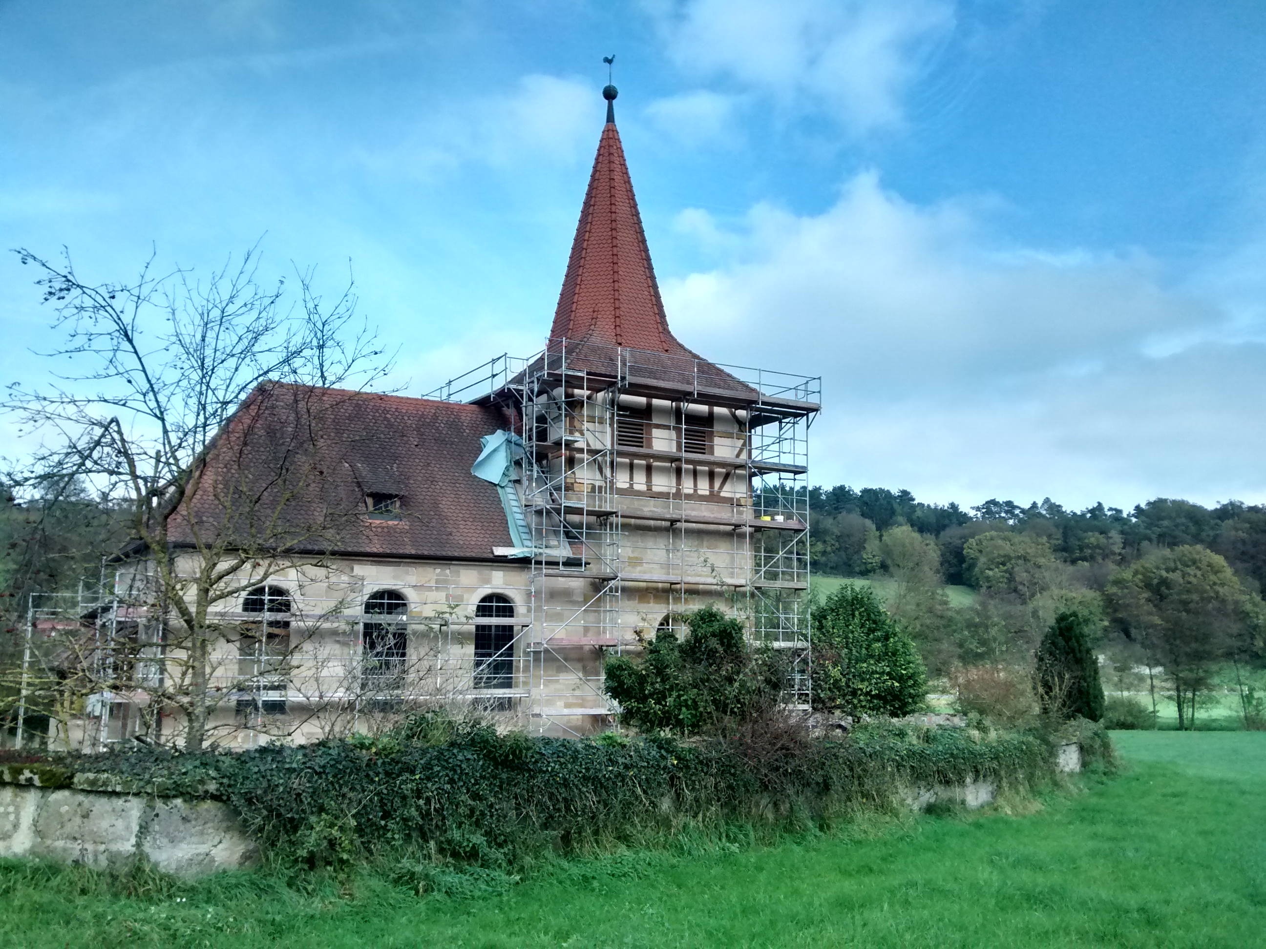 Denkmalgeschützte Kirche St. Mauritius in Warzfelden, Dietenhofen